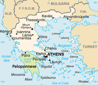 Peloponnese Map